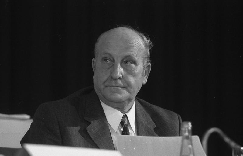 CDU-Parteitag 1972 in der Wiesbadener Rhein-Main-Halle. (Karl Bewerunge, MdB) 9.-11.10.1972